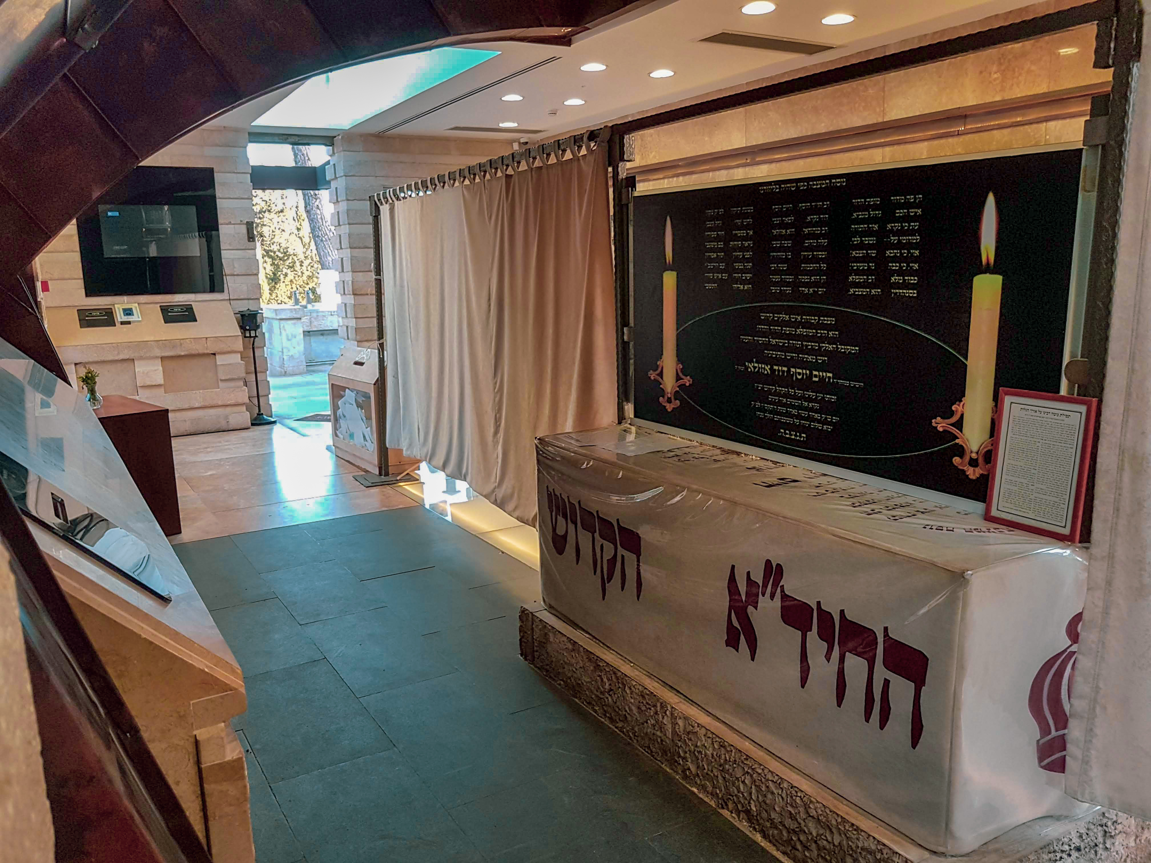 ציון החיד"א בהר המנוחות ירושלים